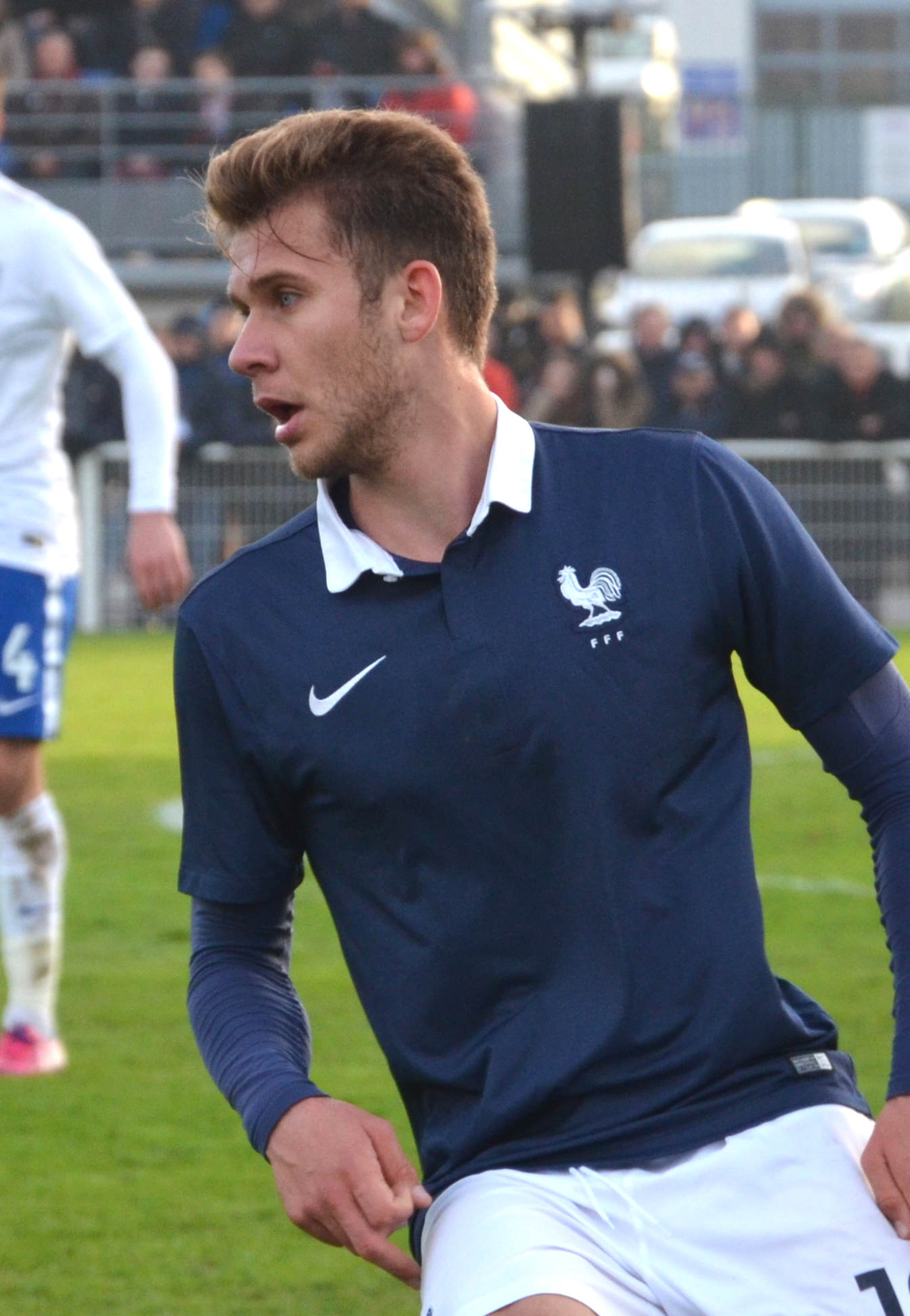 Photographie prise lors du match opposant la France à l'Angleterre pour les qualifications du championnat d'Europe de football des moins de 19 ans 2015 au stade Louis-Villemer de Saint-Lô le 31 mars 2015. Ici, Alexis Blin.